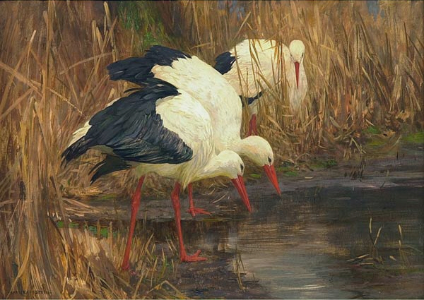 Carl Kappstein (1869–1933): Störche